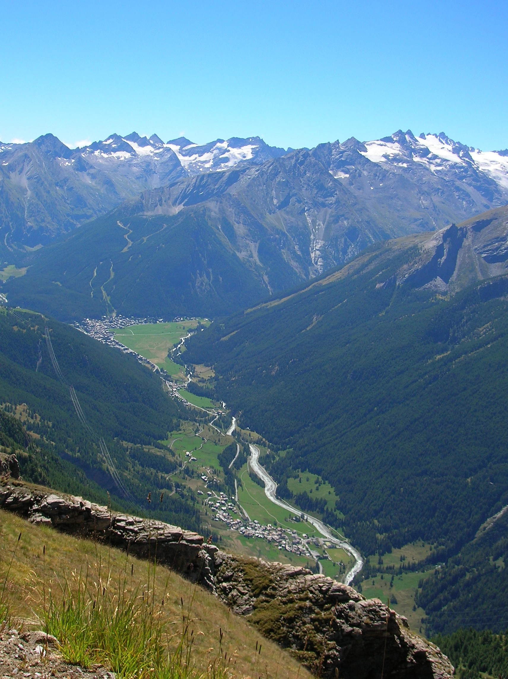 Cogne, vue générale depuis la Piatta di Grevon (Pila, Aoste).